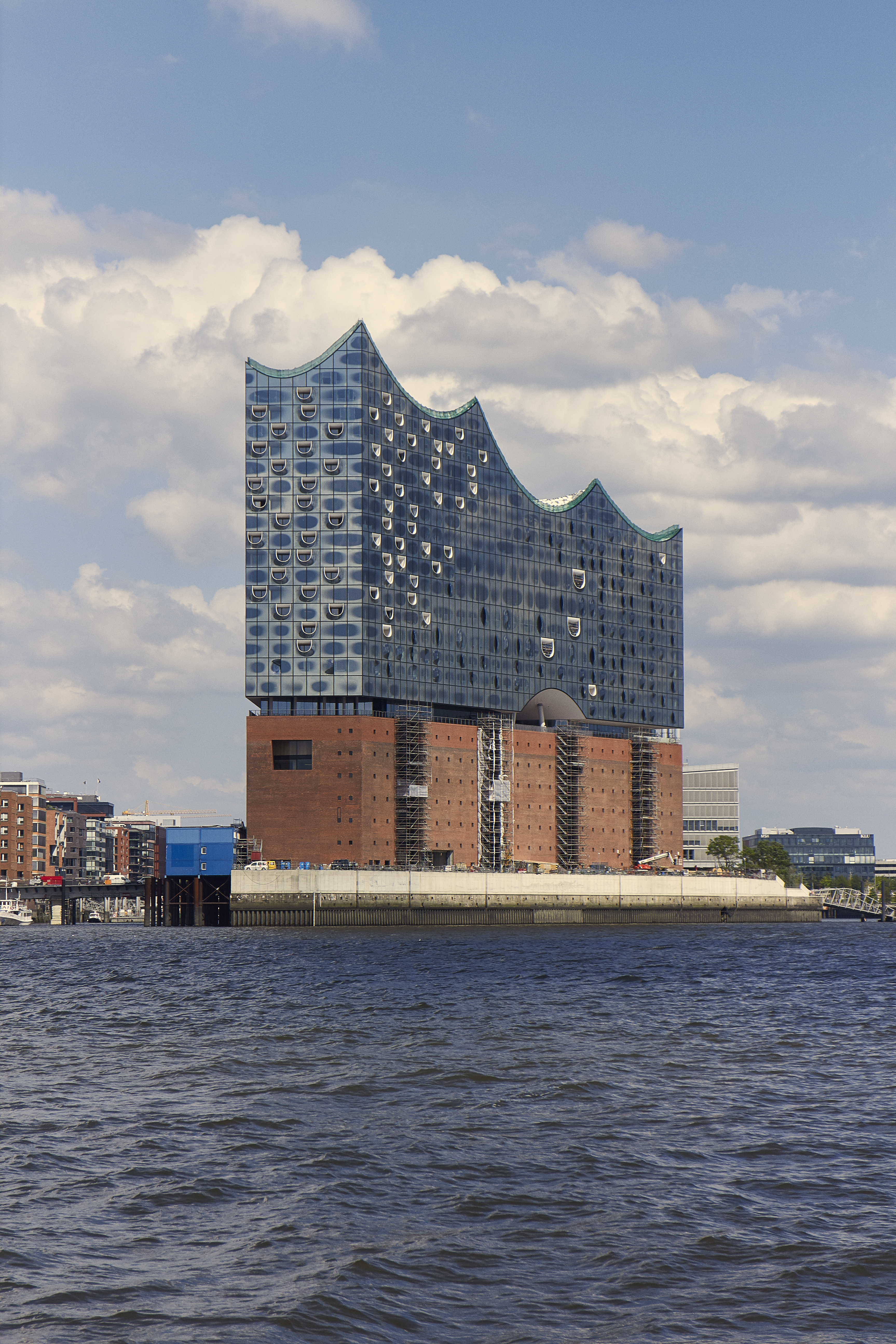 Die Elbphilharmonie ohne Baukräne - am 21.07.2015.